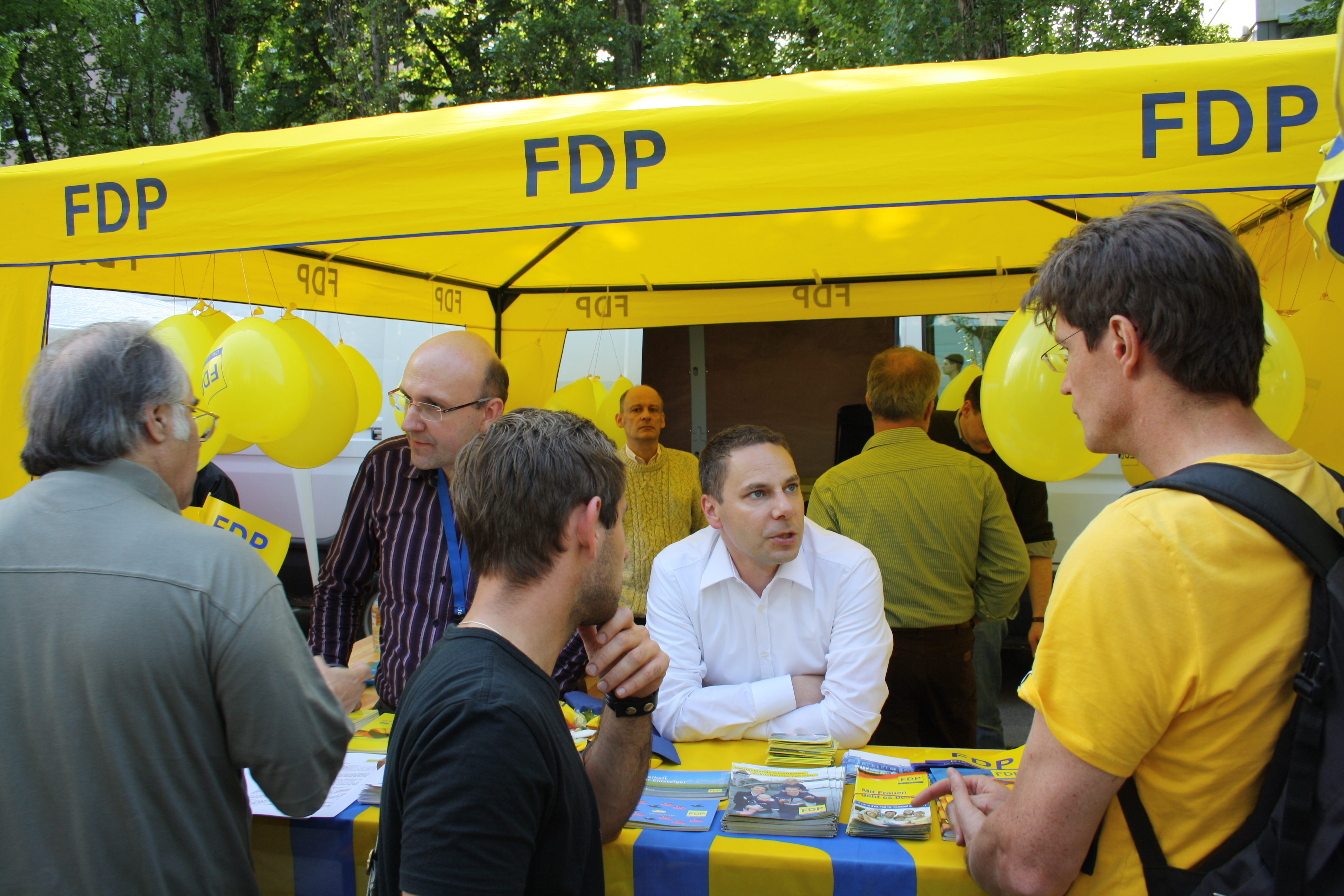 Stand der FDP auf dem Streetlife Festival/Corso Leopold